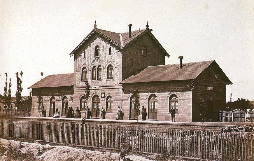 La estación de Tafalla en 1867